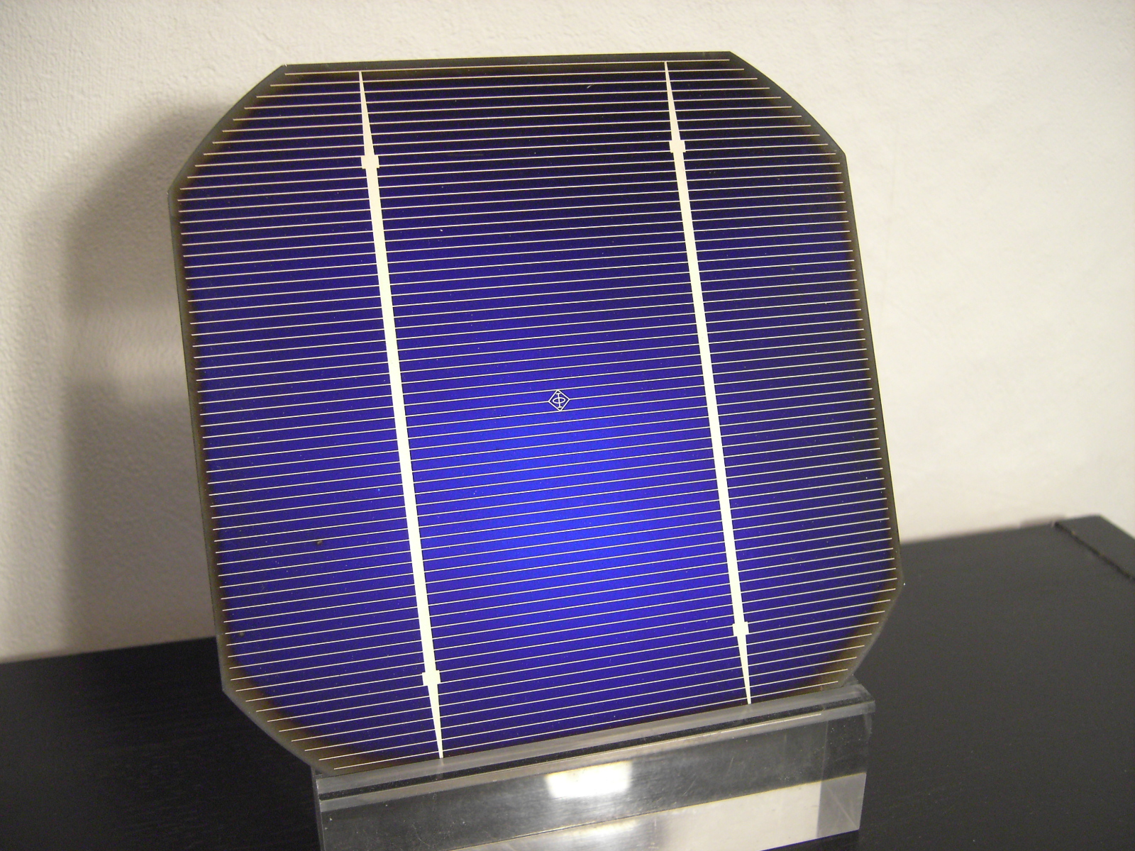 125x125 pseudo-square monocrystalline silicon solar cell, monokristaline Silizium Solarzelle